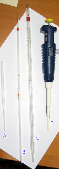 Pipety laboratoryjne